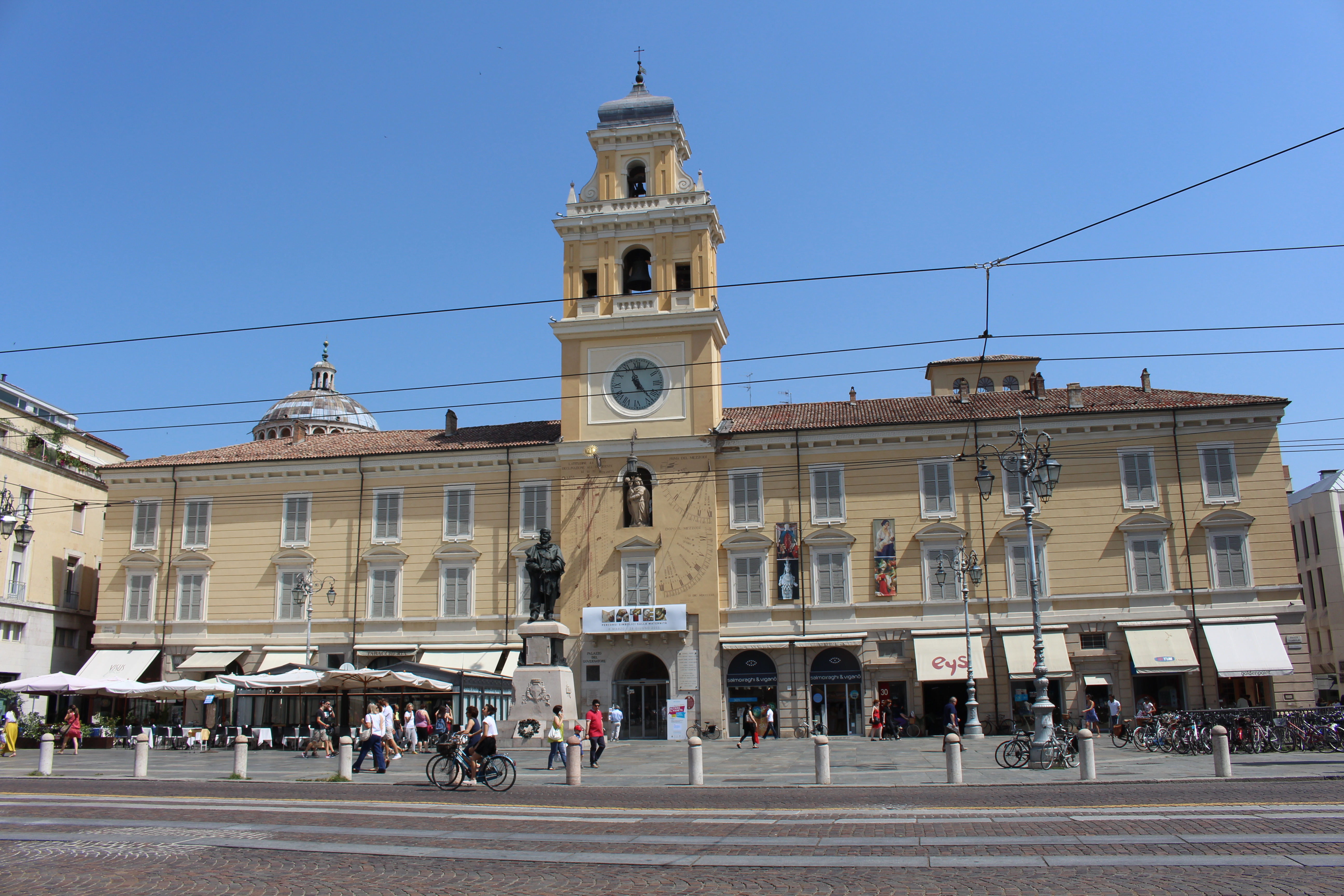 Palazzo del Governatore This is a photo of a monument which is part of cultural heritage of Italy.